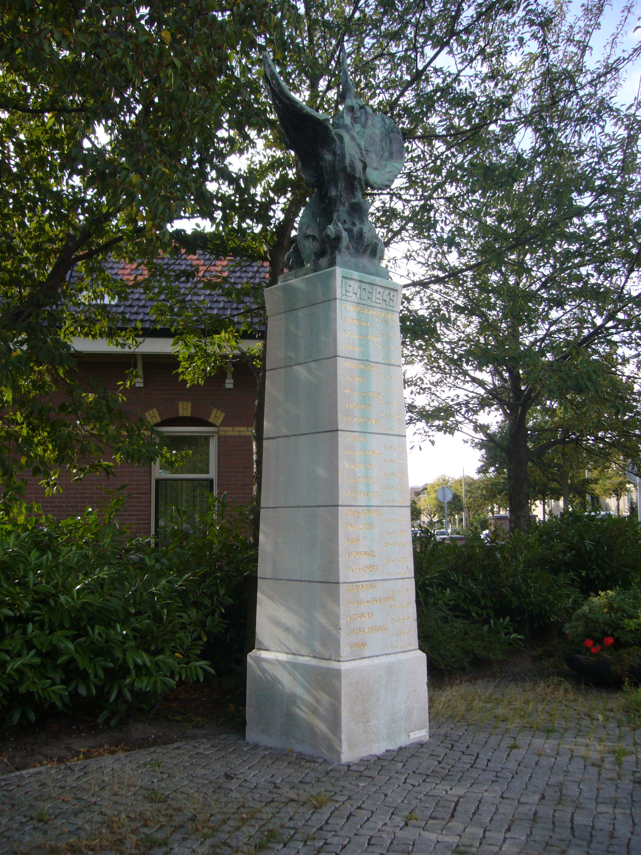 Haags bevrijdingsmonument in Loosduinen